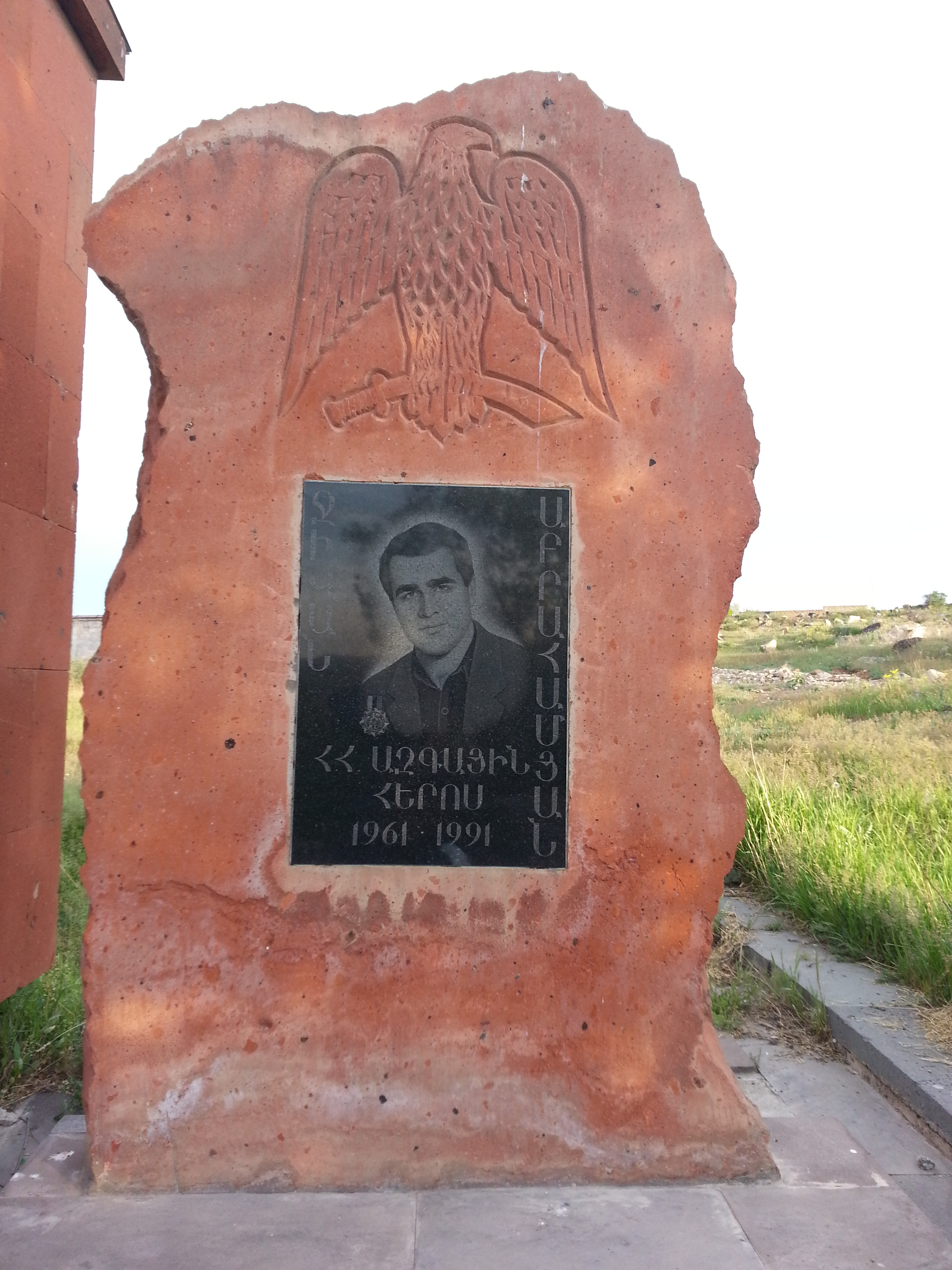 ՀՀ Ազգային հերոս Ջիվան Աբրահամյանի հուշաքարը Զովունի գյուղում